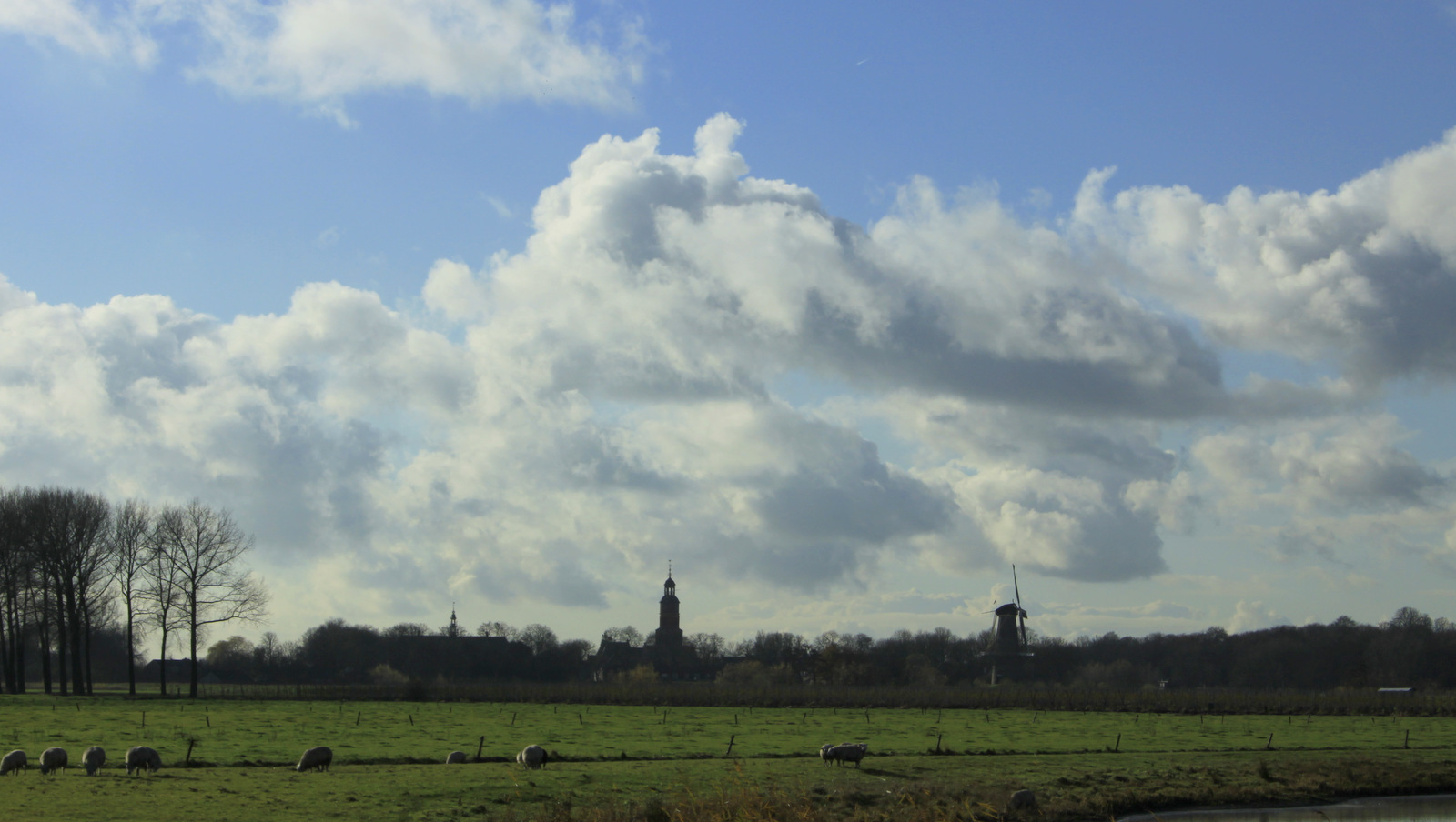 Buren in de verte gezien vanaf de Achtmorgenstraat.